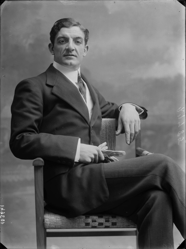 baritono Taurino Parvis